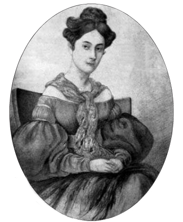 Carmen Larraín, Esposa del militar argentino Juan Gregorio de Las Heras.